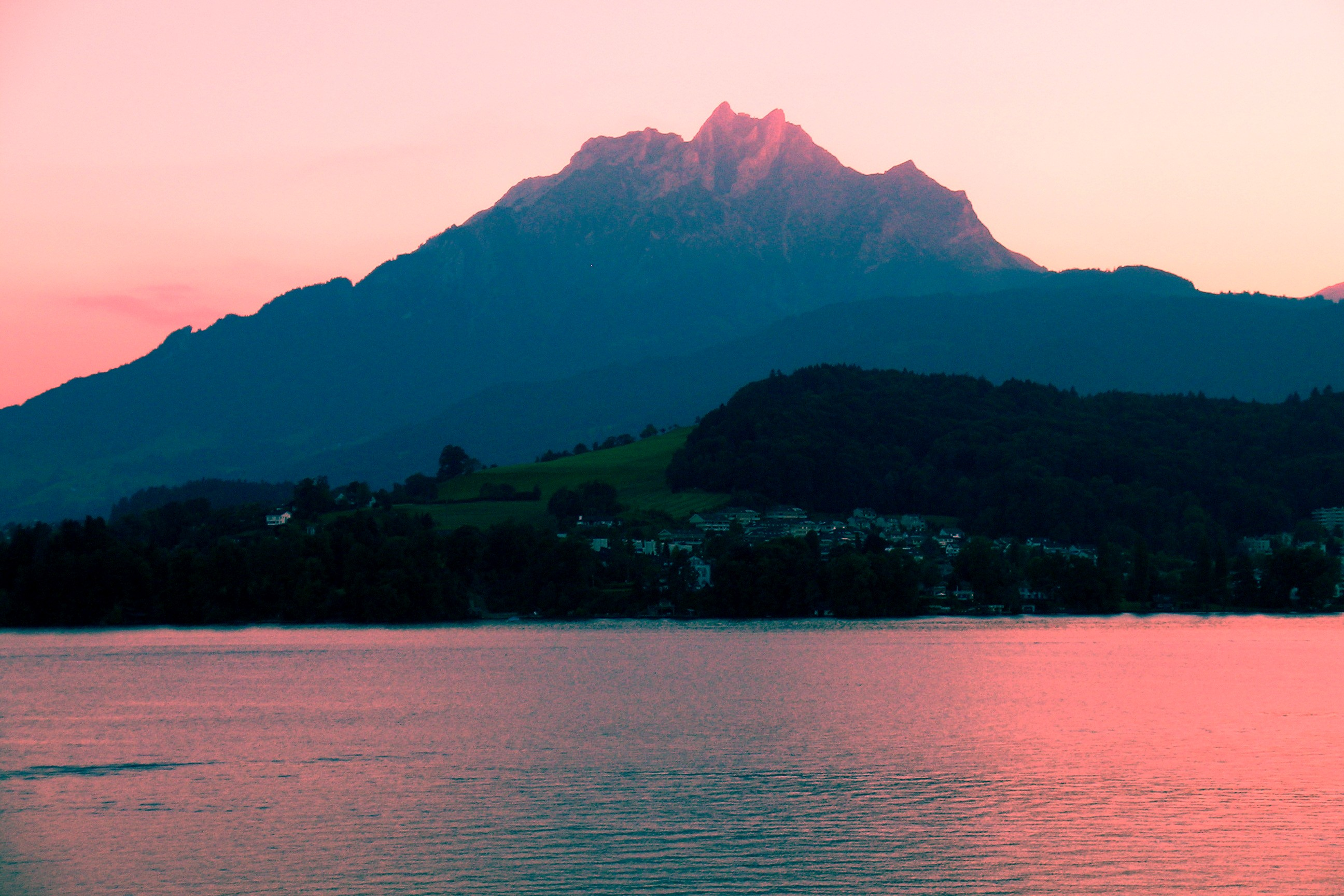 Vierwaldstättersee Pilatus